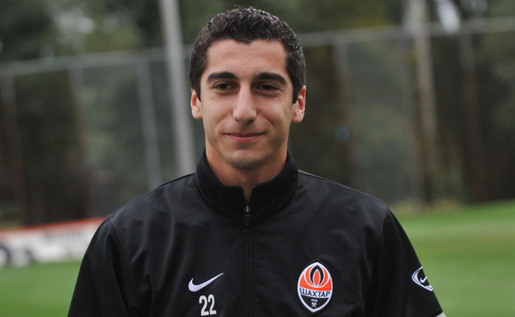 Генрих Гамлетович Мхитарян — армянский футболист.